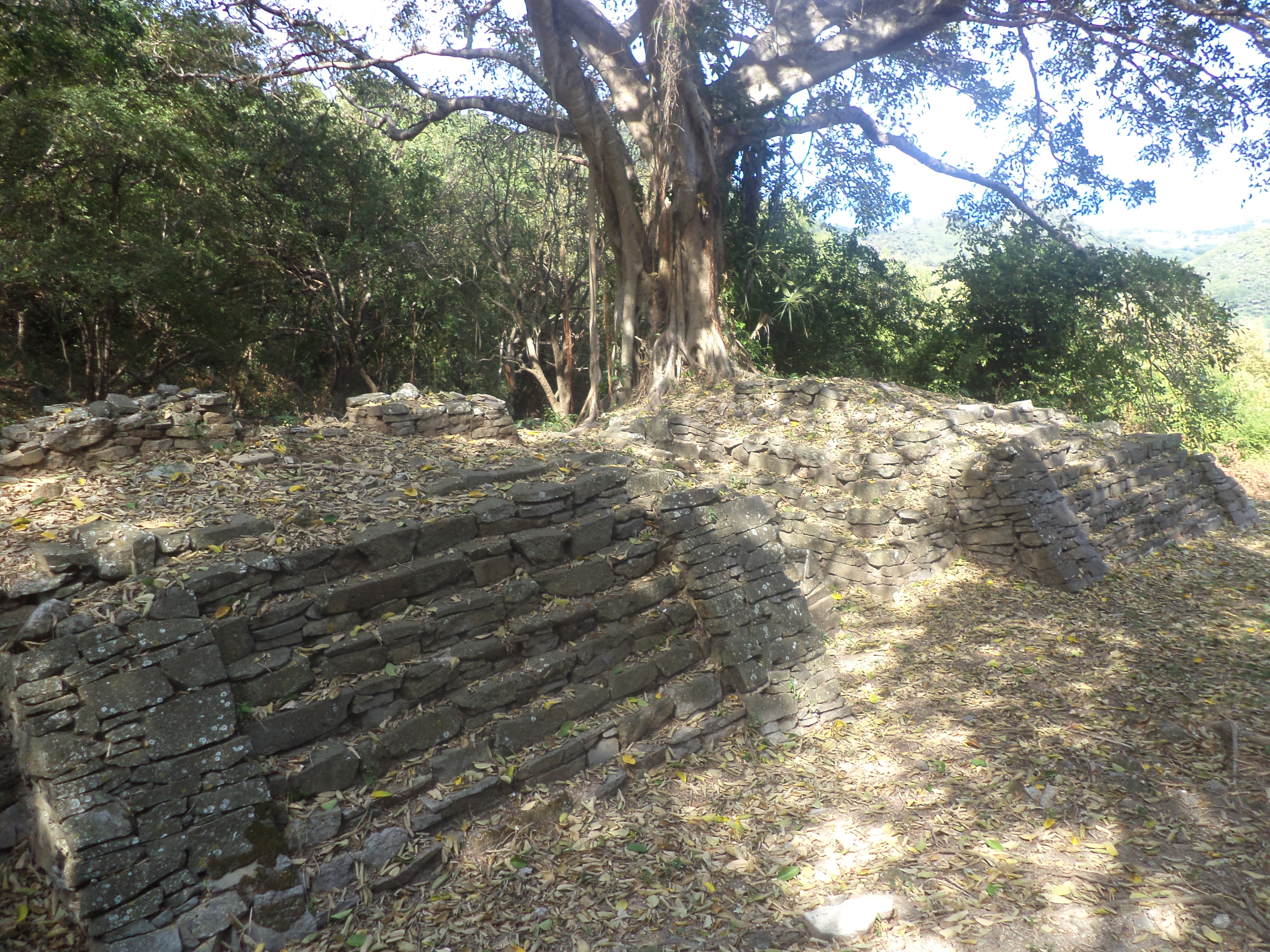 Quiahuiztlan